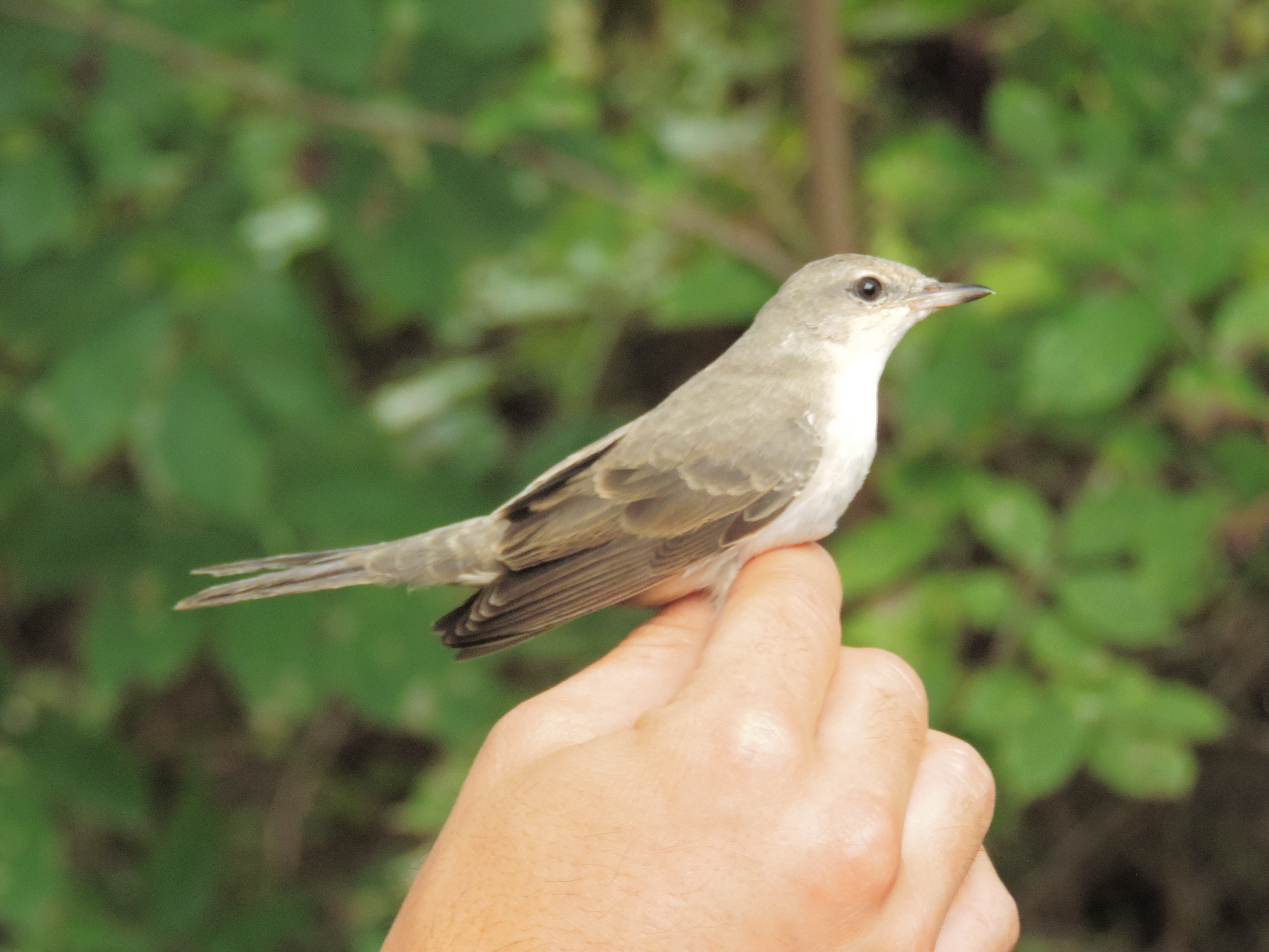 Prise à Ócsa, Hongrie